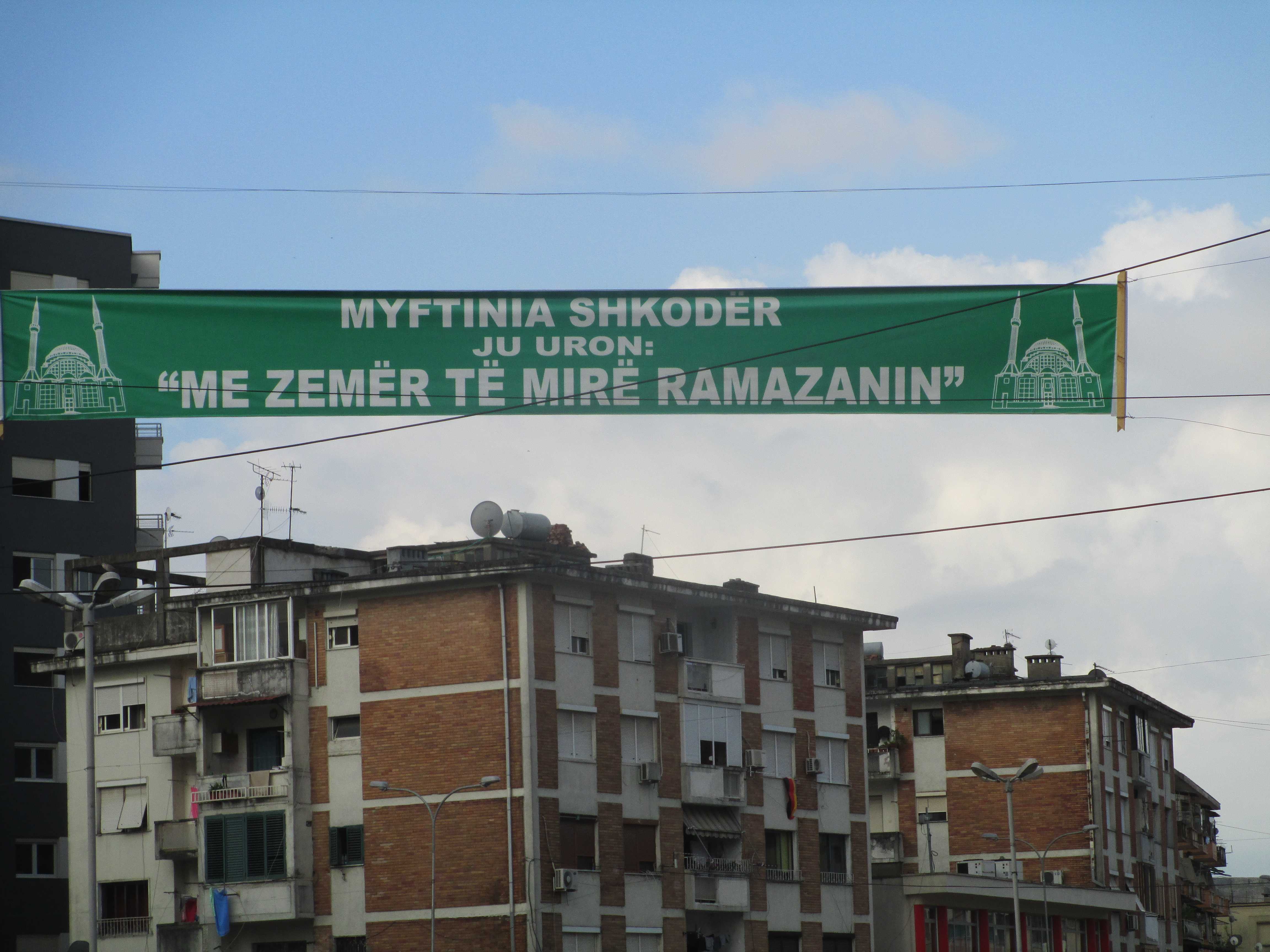 כרזת רמאדן בשקודרה